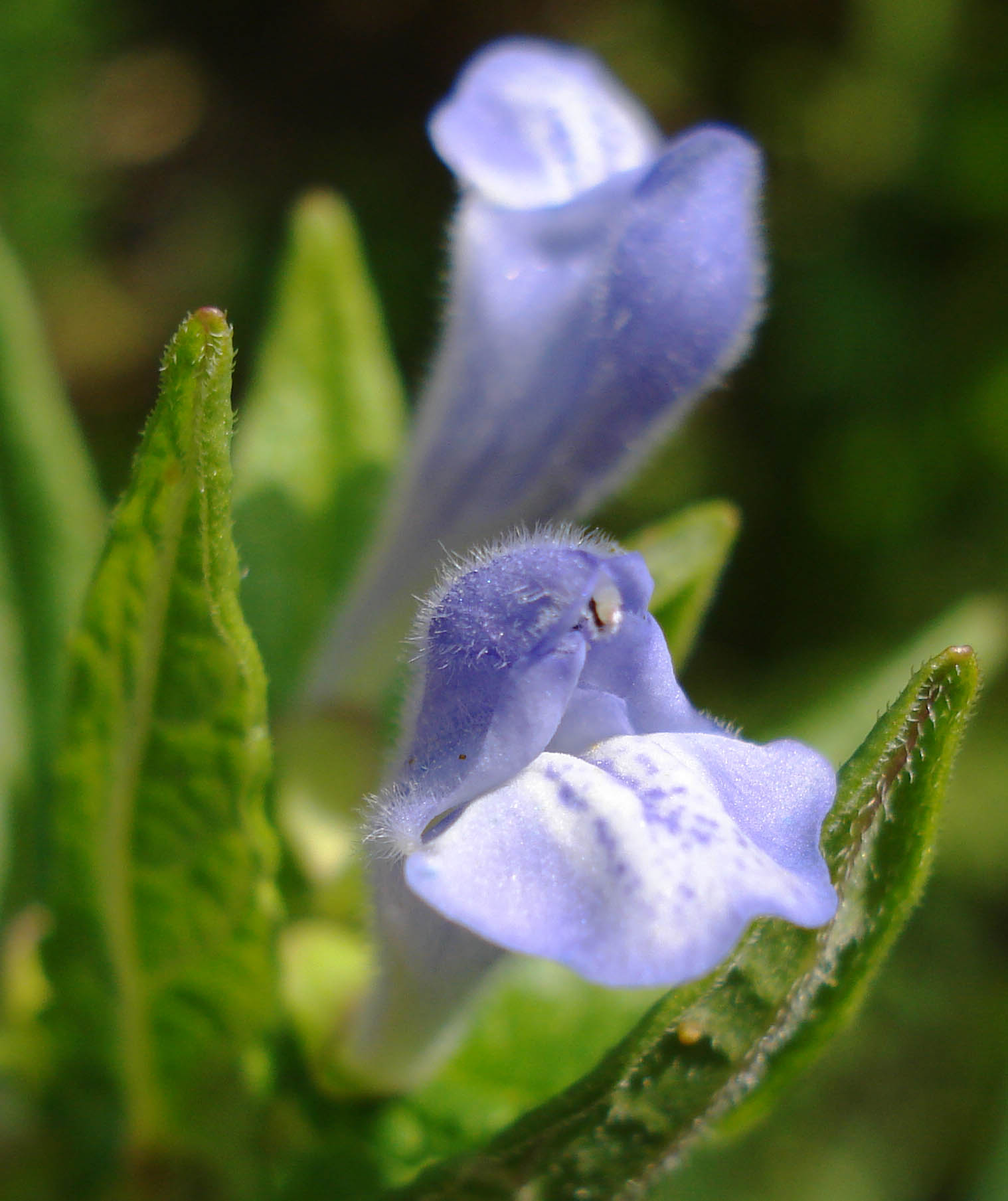 Scutellaria galericulata (Unterfranken, Germany)